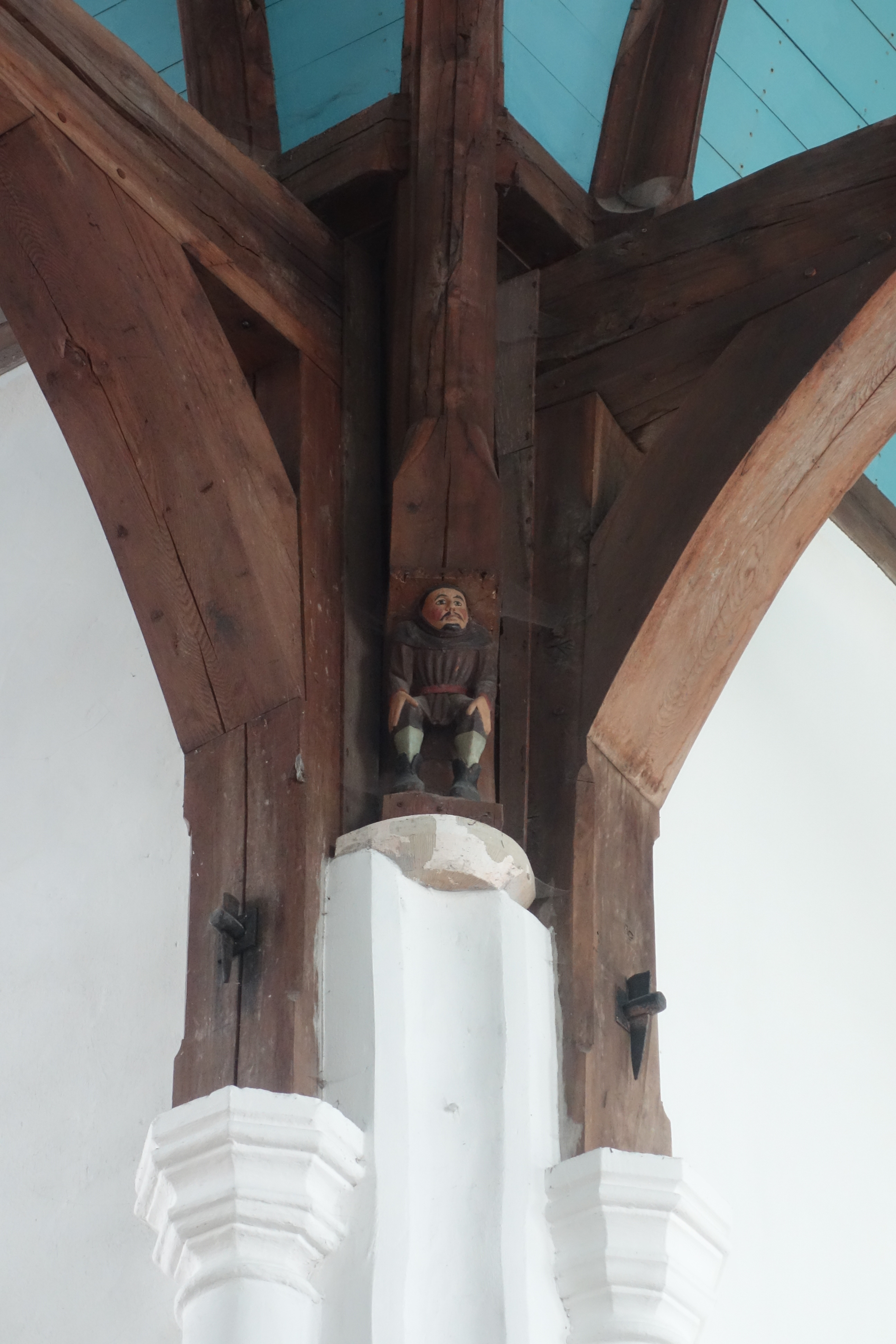 Een van de mannelijke schalkbeeldjes in de Hervormde kerk van Oosthuizen. Dit is of Boekmeyer of Abbegeerte. De beelden zijn in 1960 in de kruising van de kerk geplaatst op de plek waar eerder ook beeldjes hebben gezeten. De beelden komen uit een in 1875 gesloopte kerk in Nieuwe Niedorp.